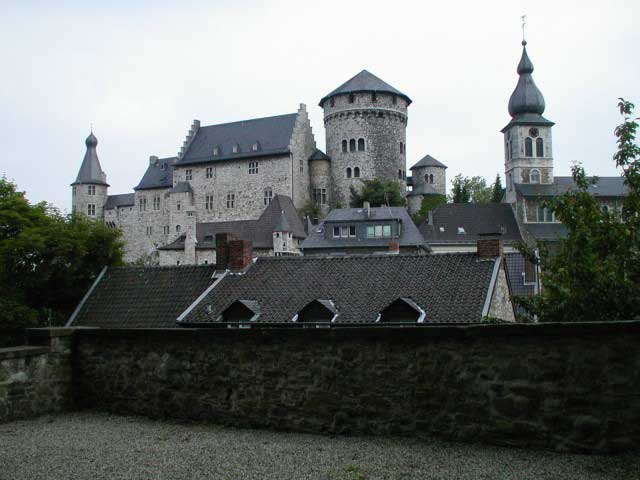 Burg_und_St._Lucia_in_Stolberg_(Rhld.). Bei dem kleinen Turm zwischen Bergfried und kirchturm handelt es sich um einen Dansker (ein Toilettenturm).